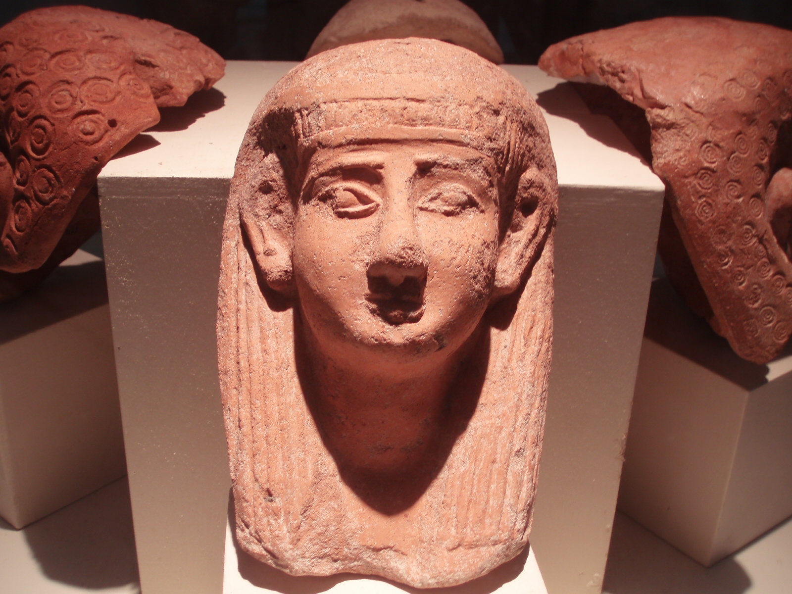 Ceramica punica nel Museo Whitaker a Mozia (Sicilia).